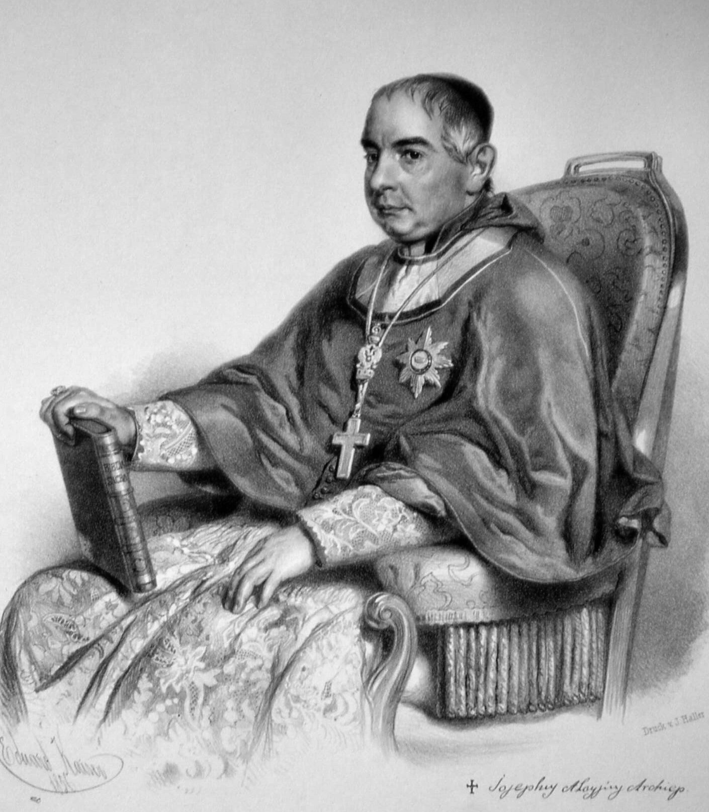 Giuseppe Luigi Trevisanato, Lithographie von Eduard Kaiser, 1856